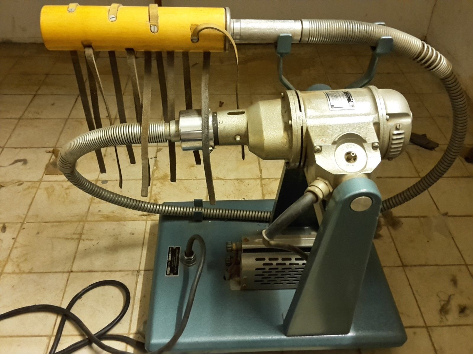 Alte Pelz-Handklopfmaschine der Firma Otto Baumberger & Co., Leipzig. Masch.-Typ: HKM, Masch-Nr. 2704.